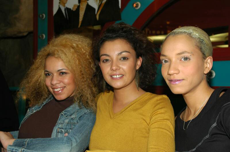 Tic Tac Toe in Wien (2006)